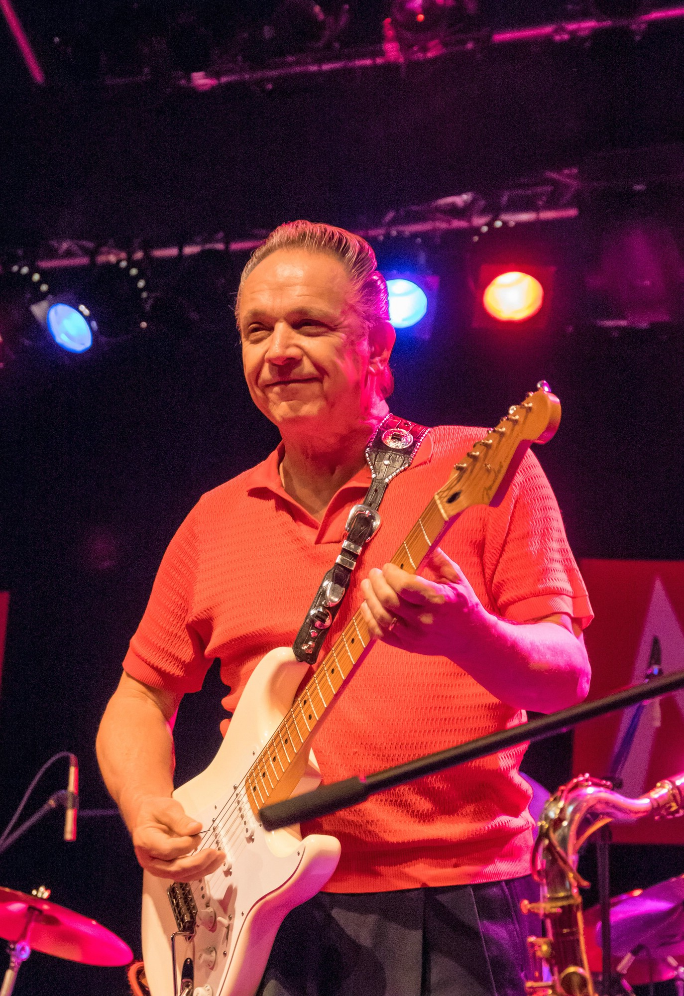 Das Zelt Musik Festival 2014 in Freiburg im Breisgau (16.07.2014 - 03. 08.2014) 17.07.2014 Äl Jawala Canned Heat Kapelle 3 Jimmie Vaughan